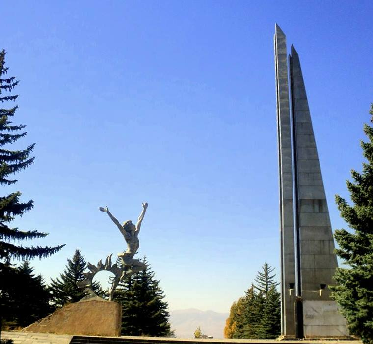 Հուշահամալիր «Վերածնունդ», Չարենցավան քաղաքի մուտքի մոտ, ճարտարապետ Հ. Առաքելյան, քանդակագործ` Խաչիկ Միրիջանյան 7/3